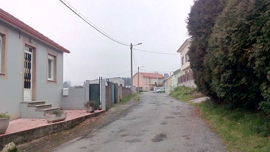 Vista da Pena Parda, Narón